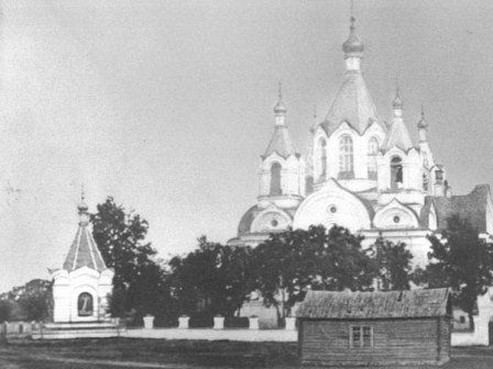 Беларуская (тарашкевіца): Усьвяты (Uśviaty), пляц Рынак (plac Rynak). Спаская царква-мураўёўка